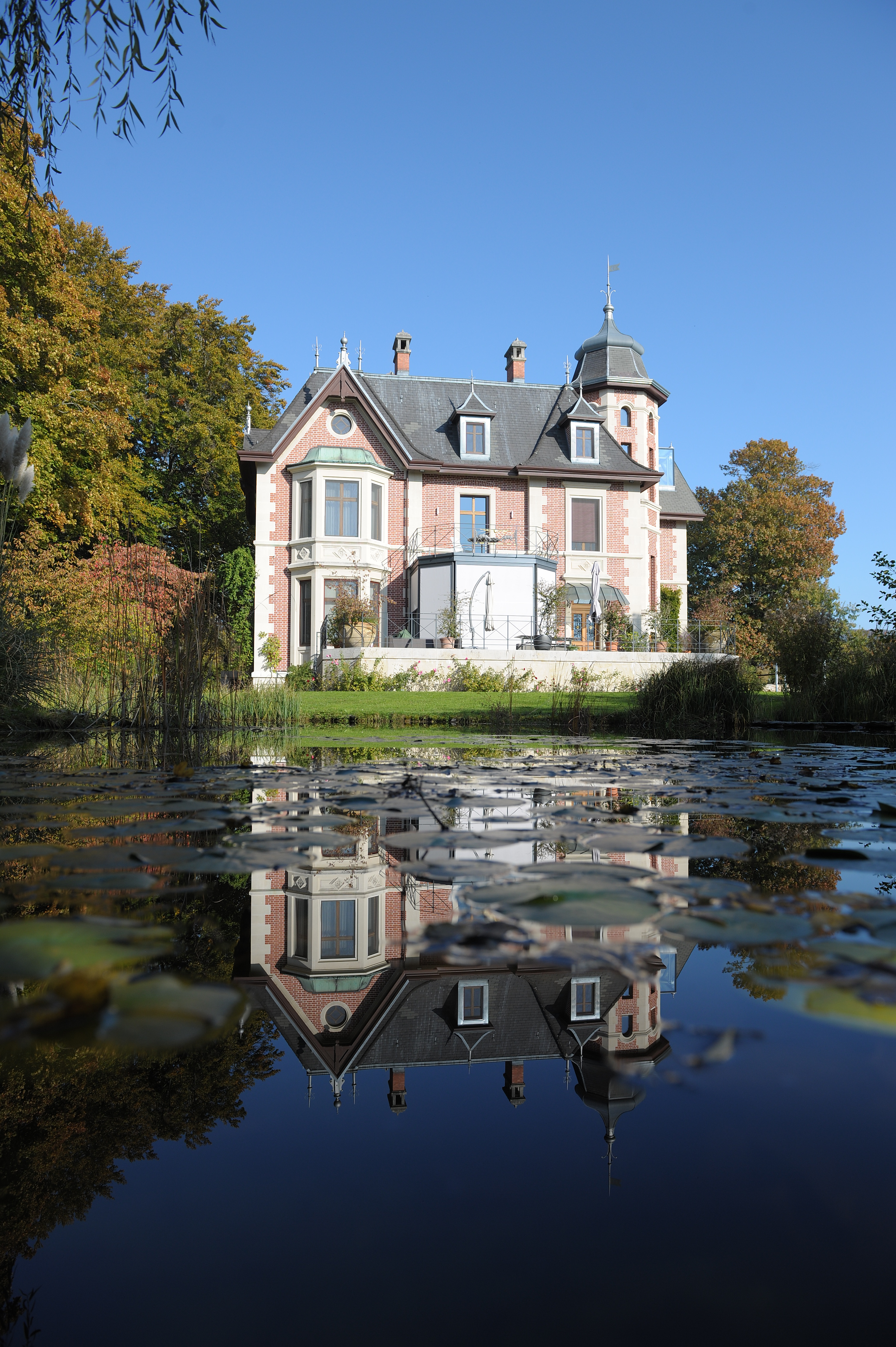 Die Villa zu den Hirzen auf dem Bäumlihofgut in Riehen (Schweiz)